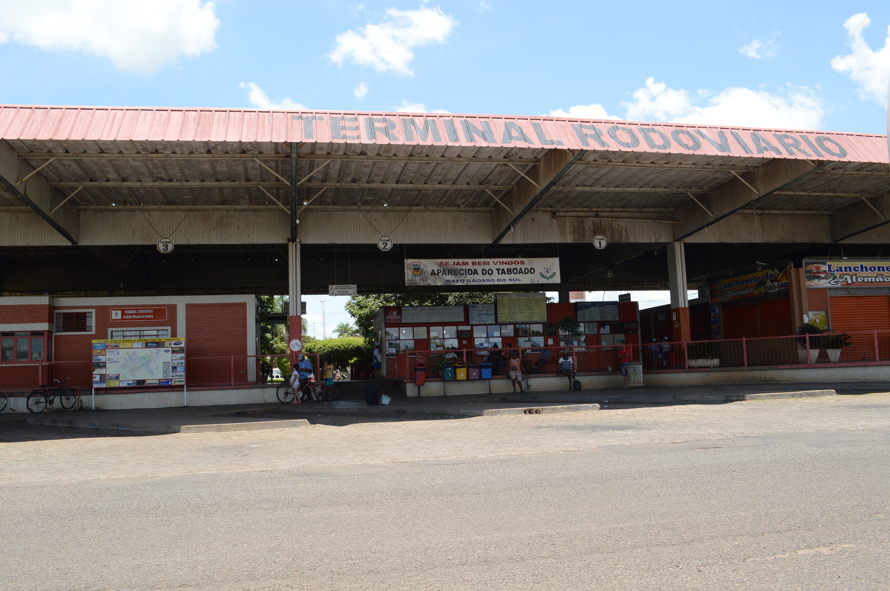 Terminal Rodoviário de Aparecida do Taboado em dezembro de 2015.